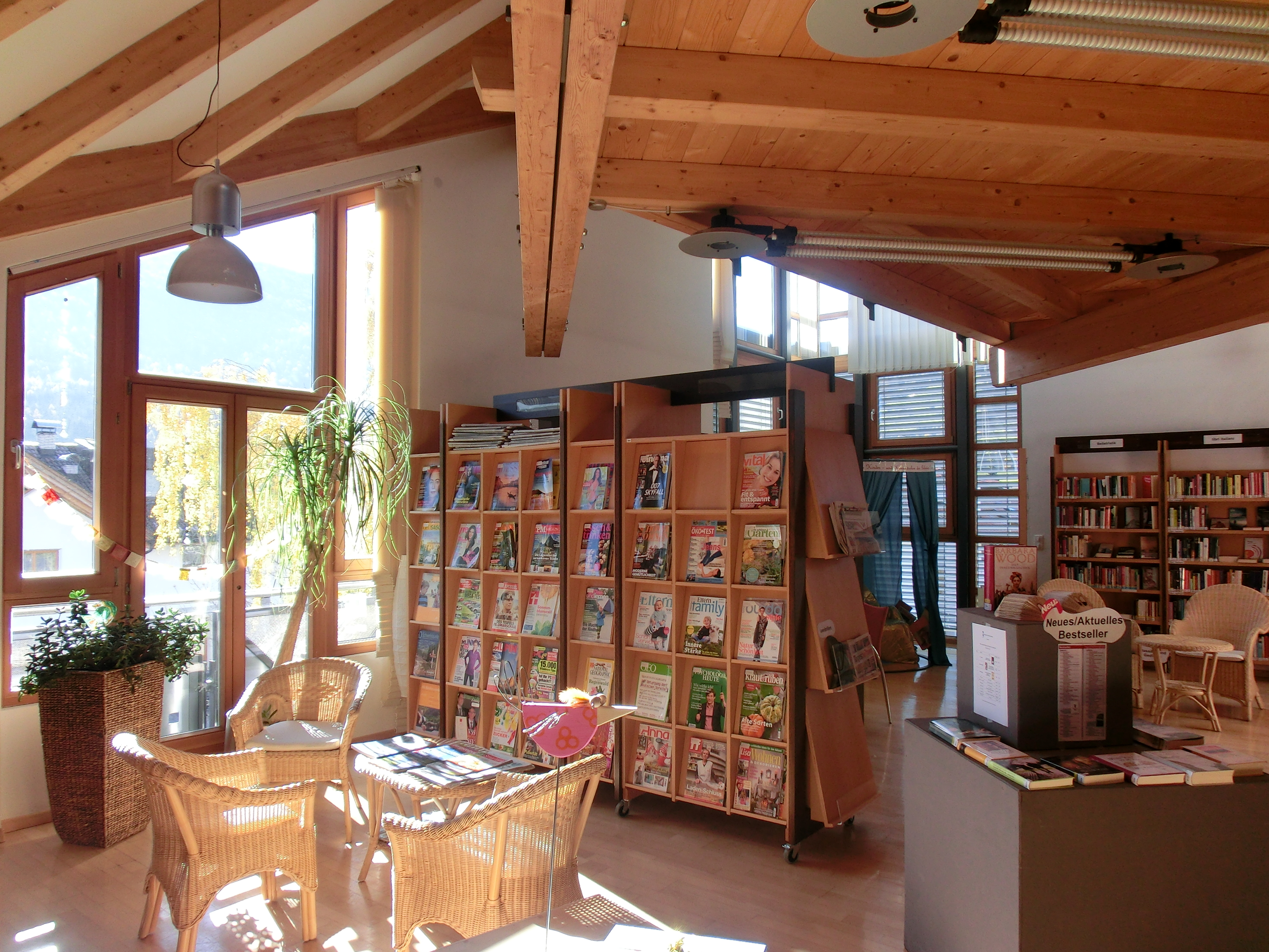 Innenansicht der Öffentlichen Bibliothek Olang